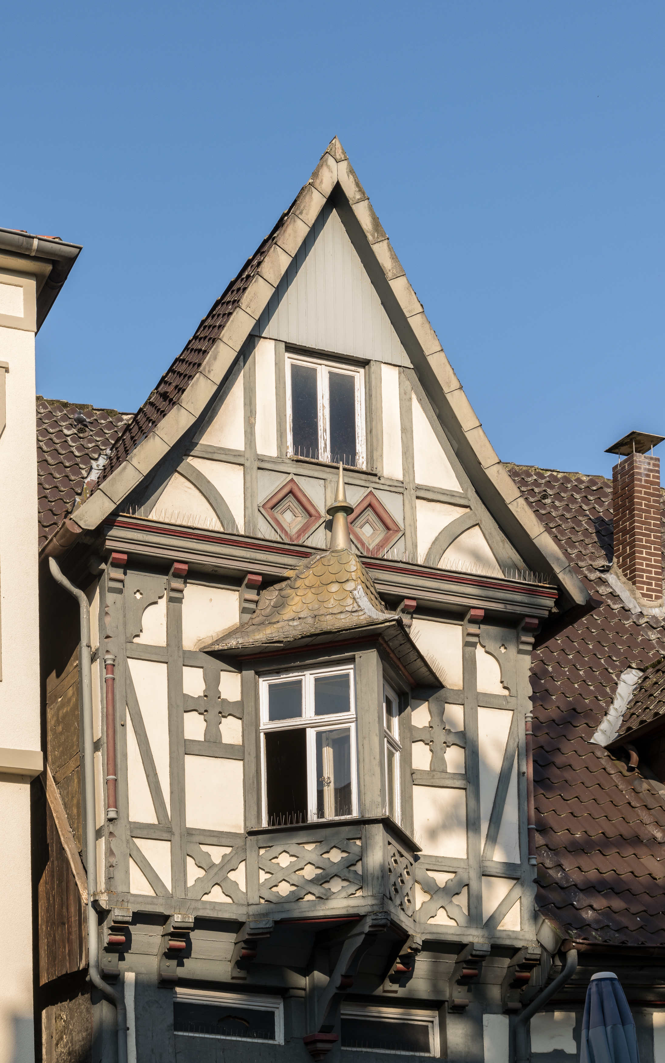 Nachträglich angebrachtes Zwerchhaus von 1891 am Haus Krumme Straße 2 in Detmold.